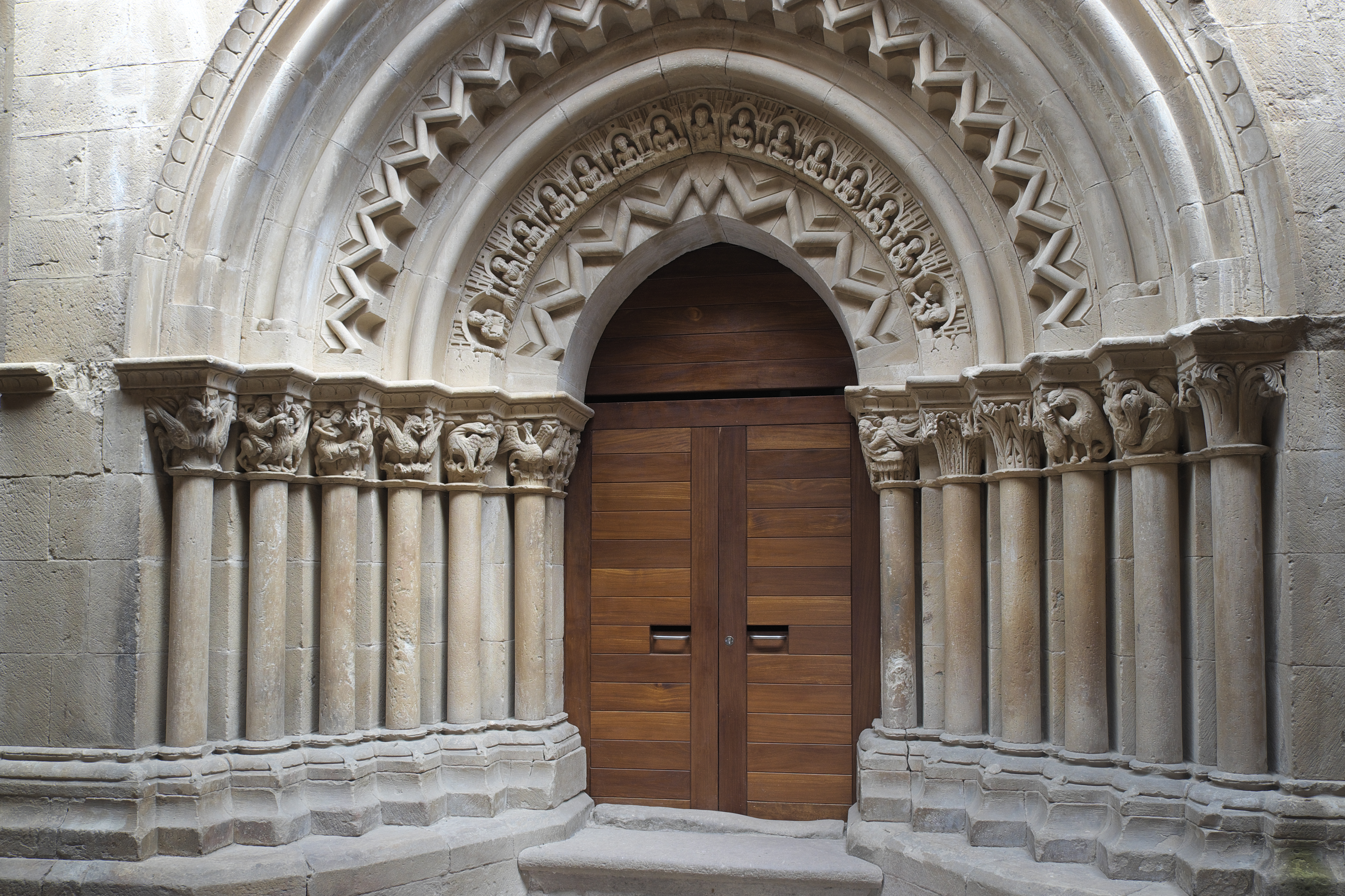 Kirche San Cornelio y San Cipriano in Revilla de Santullán in der Gemeinde Barruelo de Santullán in der Provinz Palencia (Kastilien-León/Spanien), Archivoltenportal